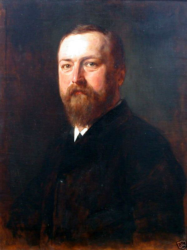 Stefan Schwartz (sculptor and medal engraver)